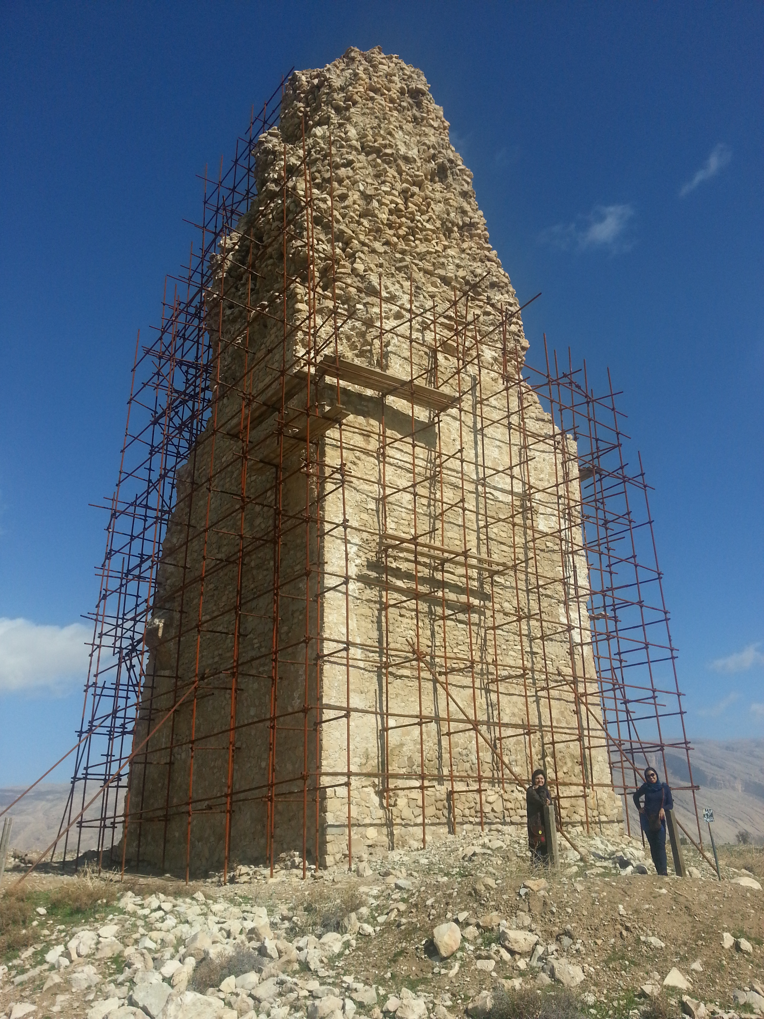 Goor Pillar, Fars, Iran (فارس ،میل شهر گور)